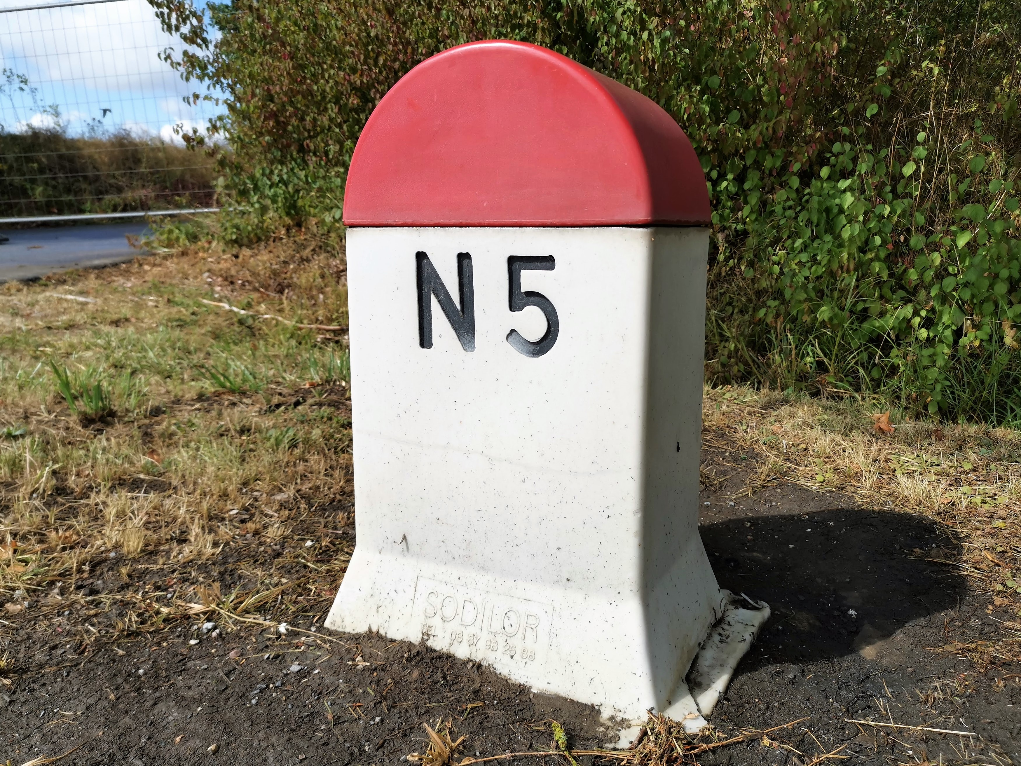 Borne kilométrique en plastique sur la N5 à Helfent.